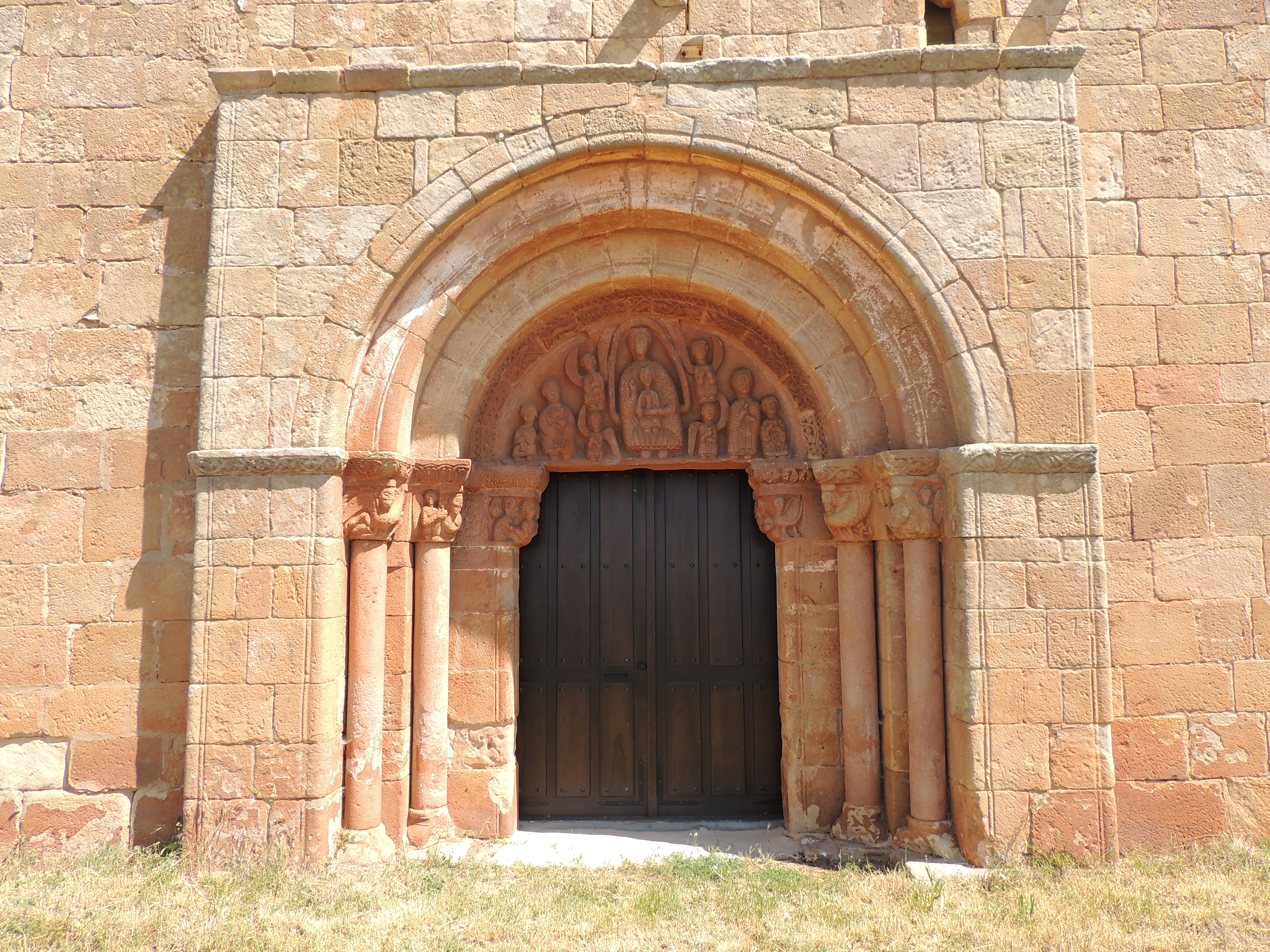 Portada